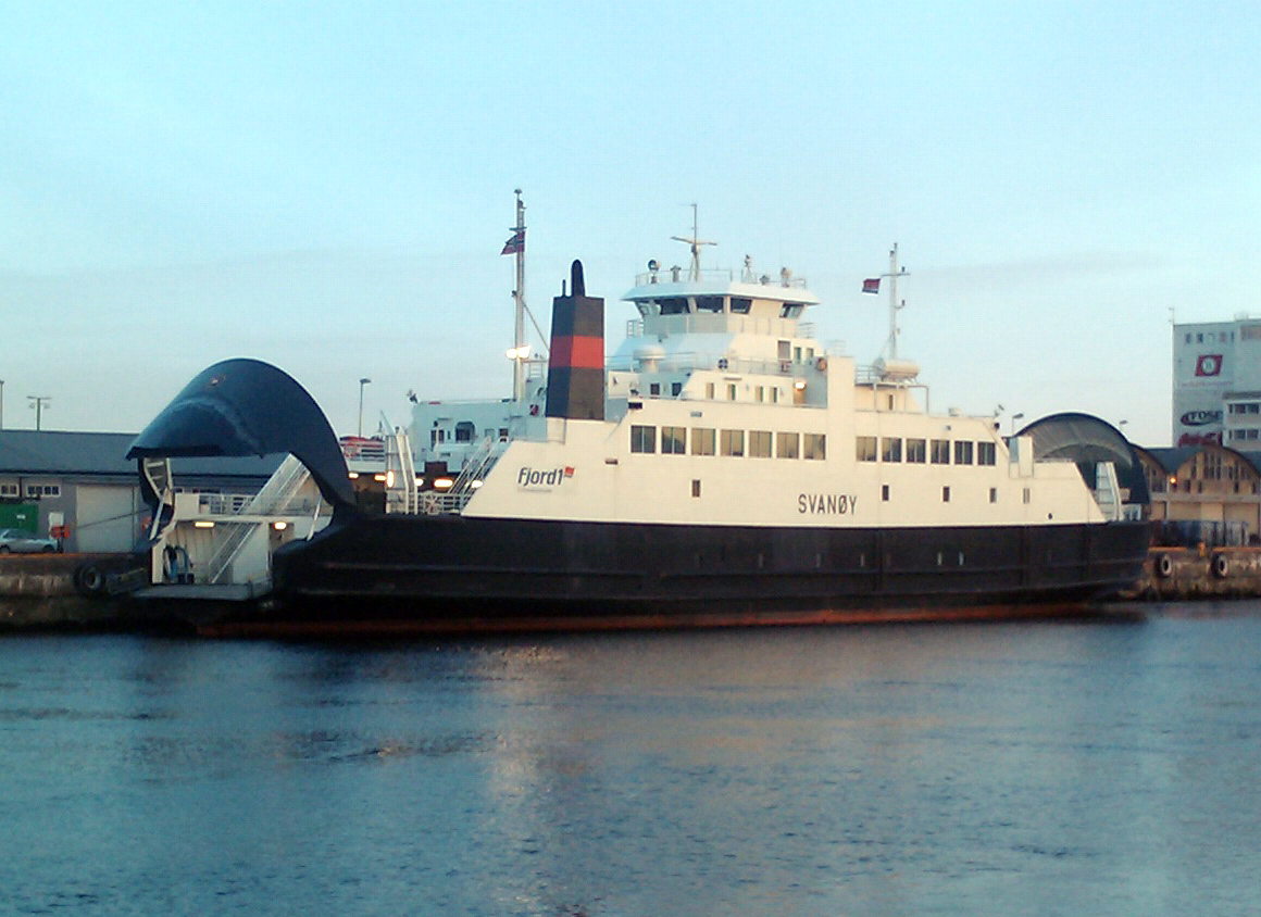 Fosenferja Svanøy.